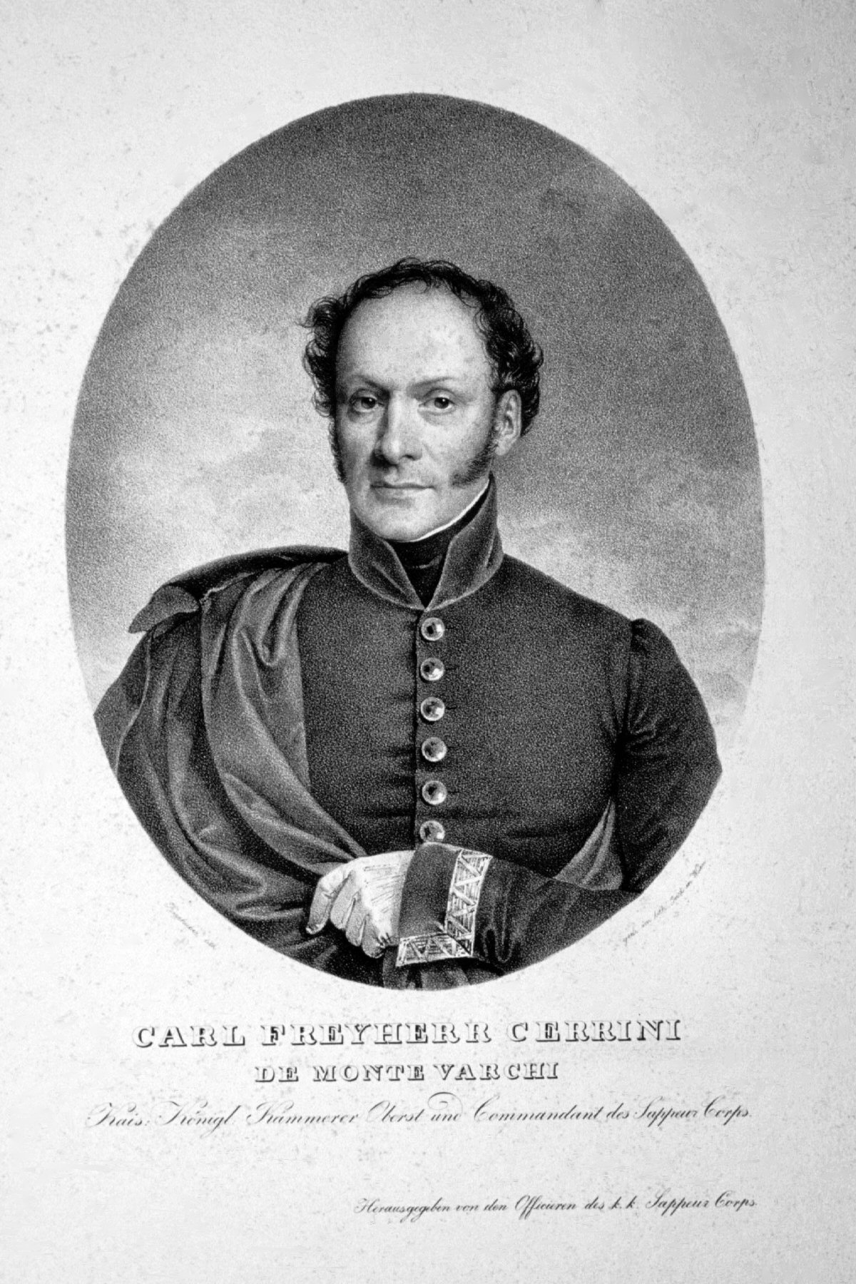 Karl Cerrini de Monte Varchi (1777-1830) Freiherr, Kämmerer, Generalmajor. Lithographie von Josef Kriehuber, um 1825.